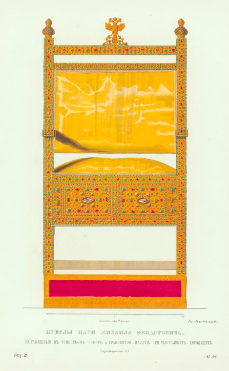 Древности Российского государства (Antiquities of Russian country), 1846—1853. Иллюстратор — Солнцев, Фёдор Григорьевич. Отделение II. Древний чин царский, царские утвари и одежды